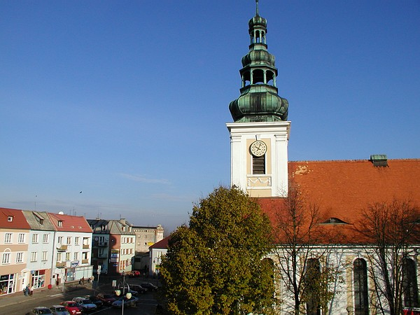 Nowe Miasto Lubawskie - dawny kosciół ewangelicki (po wojnie kino "Harmonia")